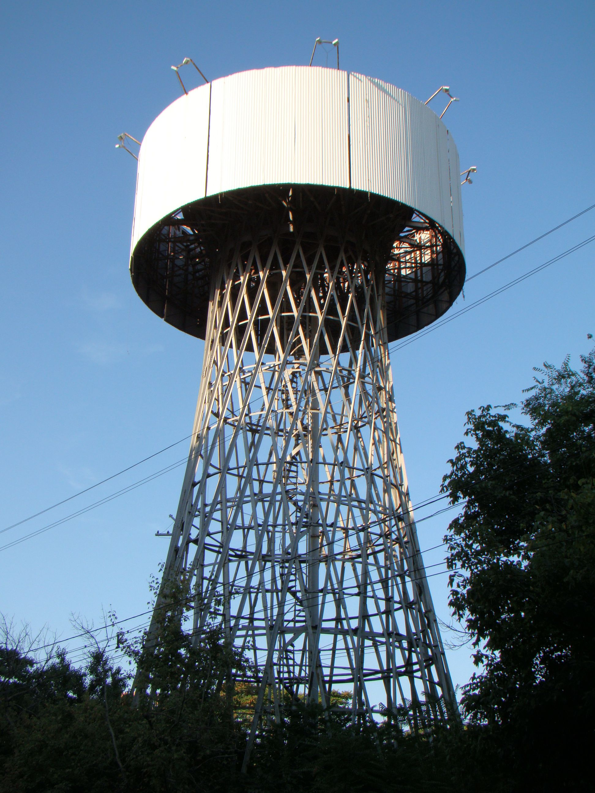 Водонапорная башня системы инженера Шухова в городе Краснодар. Расположена по адресу ул. Рашпилевская, 149. Построена в 1929-1932 гг. Памятник архитектуры федерального значения № 2310006000.